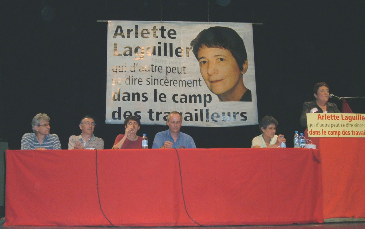 Arlette Laguiller (au micro) lors d'un meeting à Lyon (salle rameau)